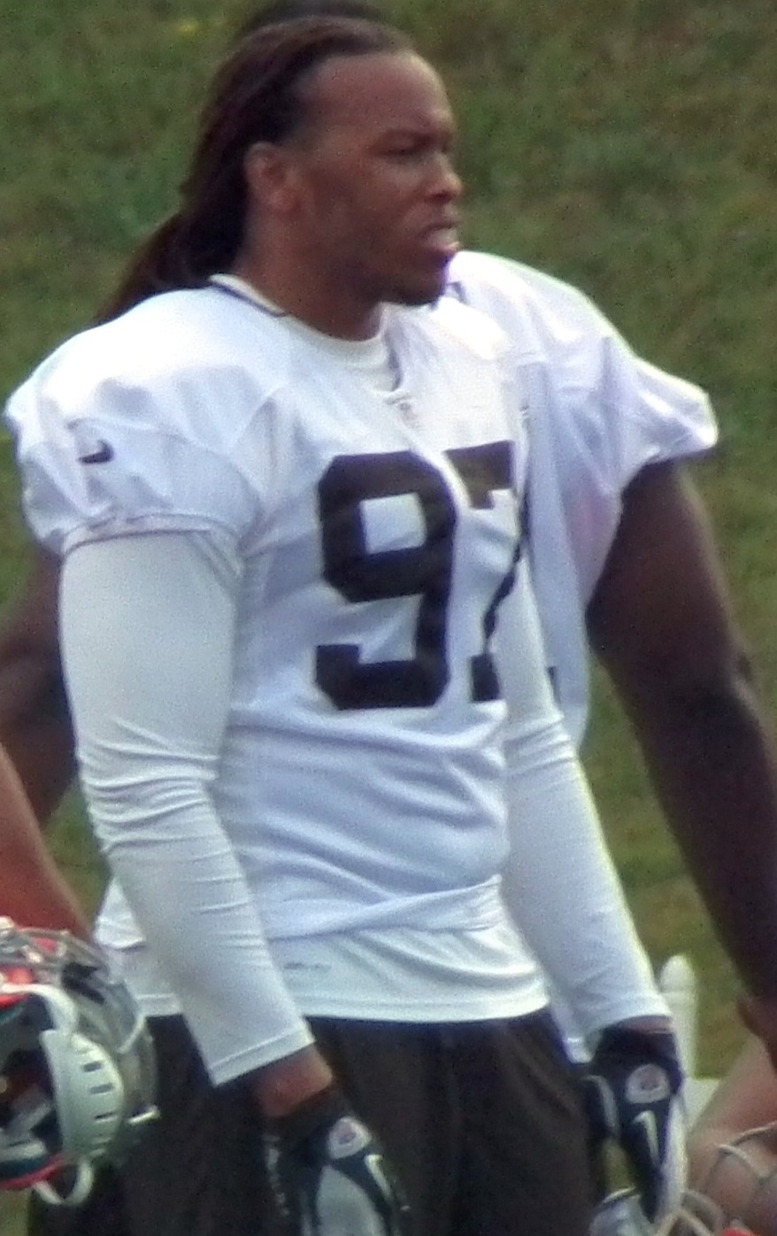 Jabaal Sheard